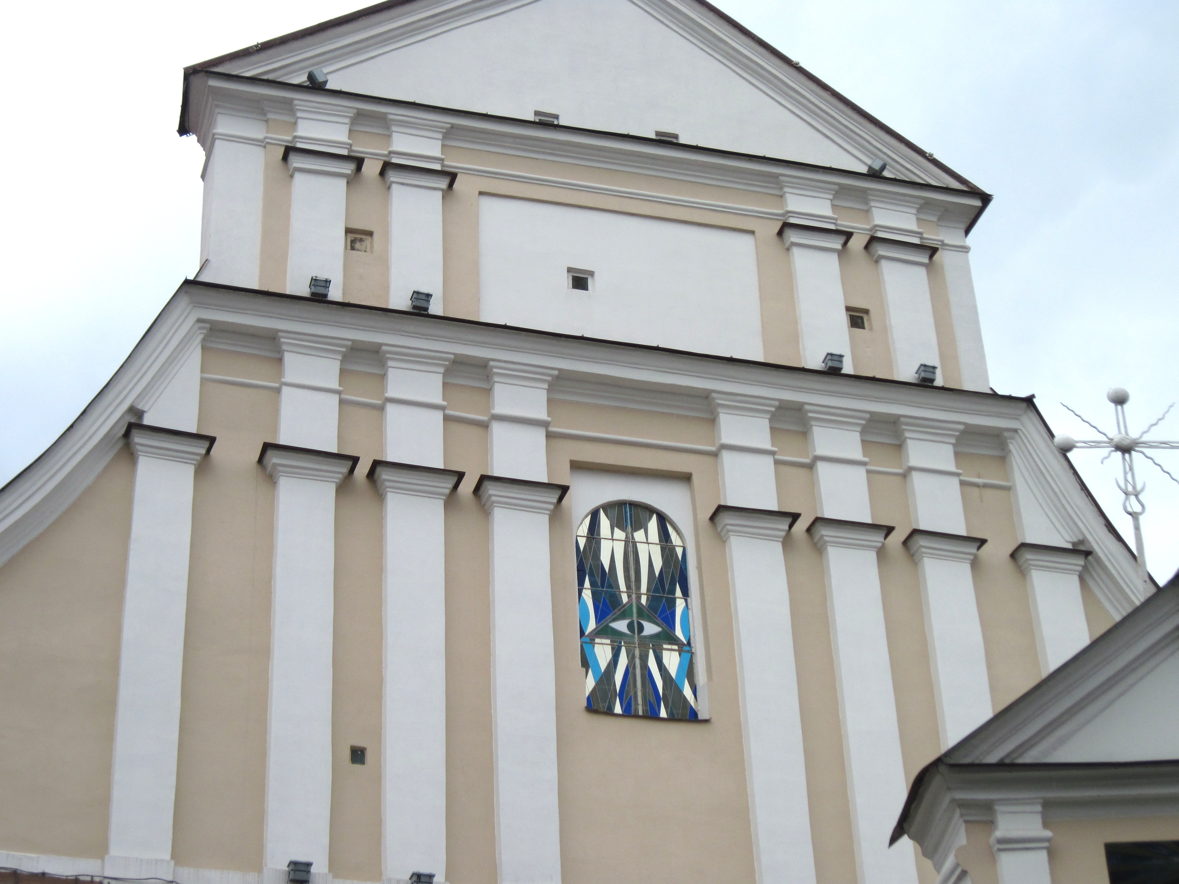 Беларуская (тарашкевіца): Фасад касцёлу францысканцаў, Гродна